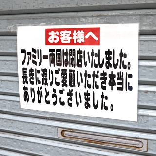 ファミリー両国本店 閉店告知